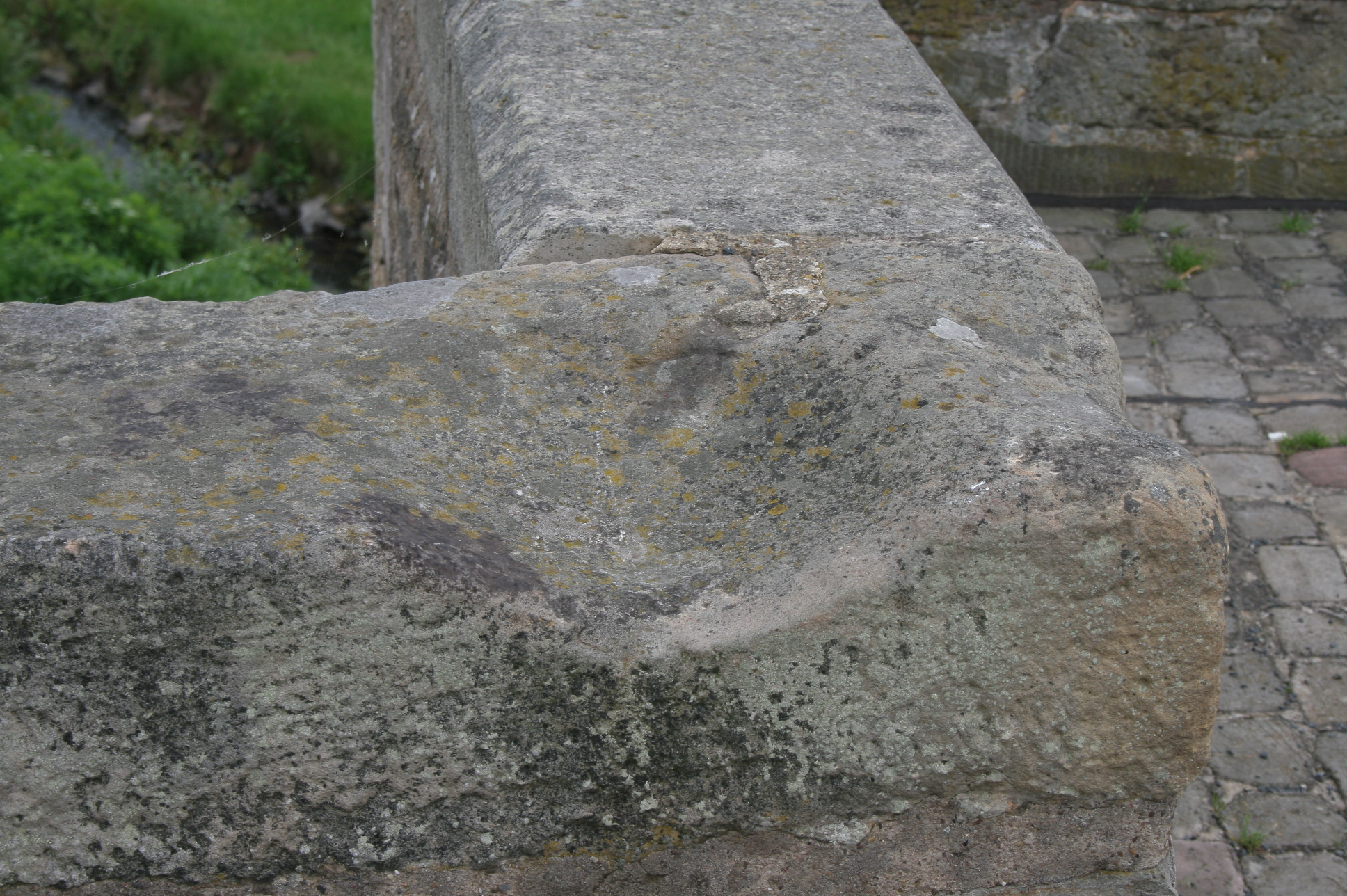 Vertiefungen in der Sandsteinbrüstung der Bartenwetzerbrücke (erbaut 1595/1596) in Melsungen. Die Vertiefungen sind durch das Wetzen (schärfen) der Barten (Äxte) im Spätmittelalter entstanden.